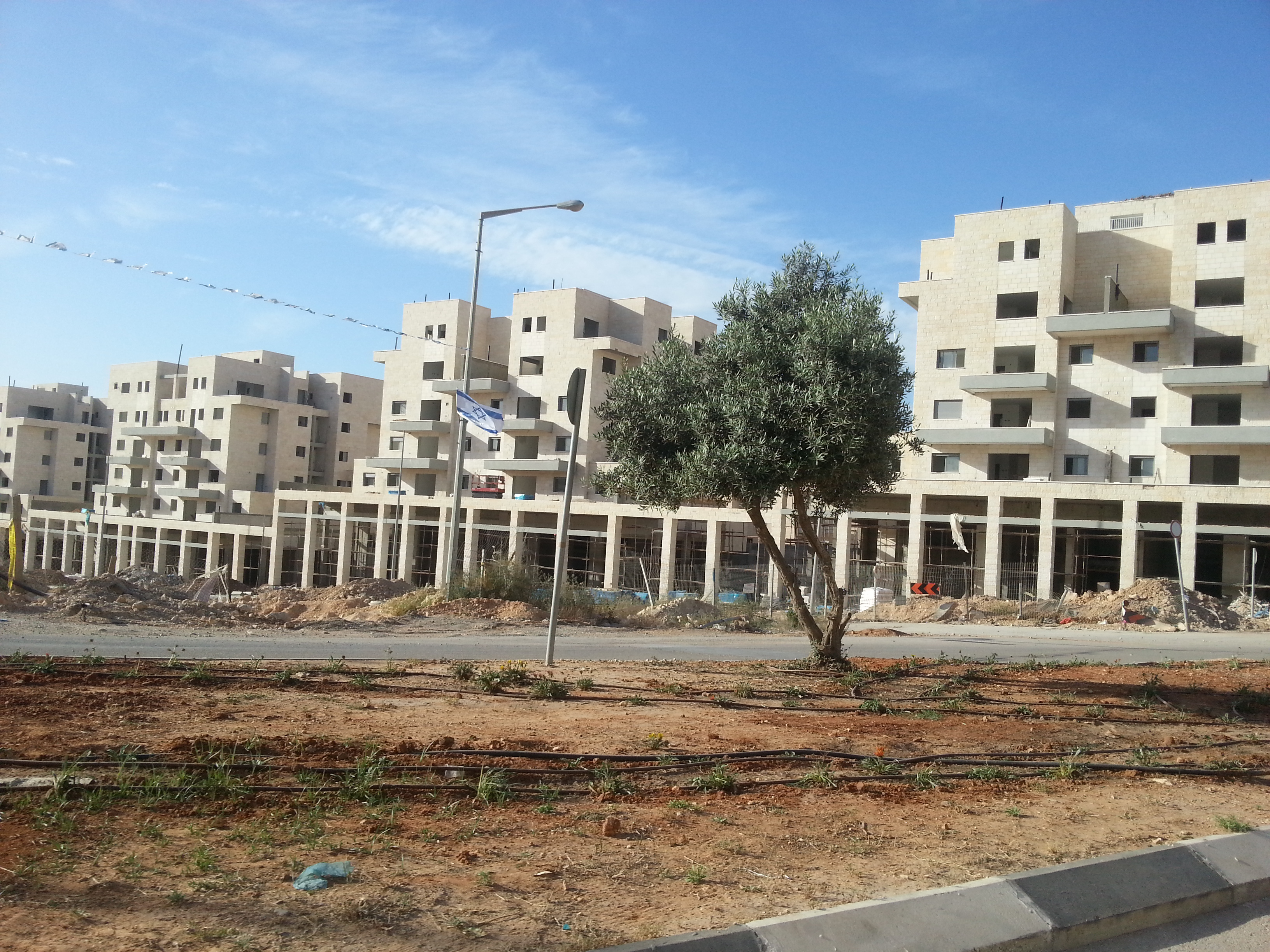 חריש, שדרה ראשית